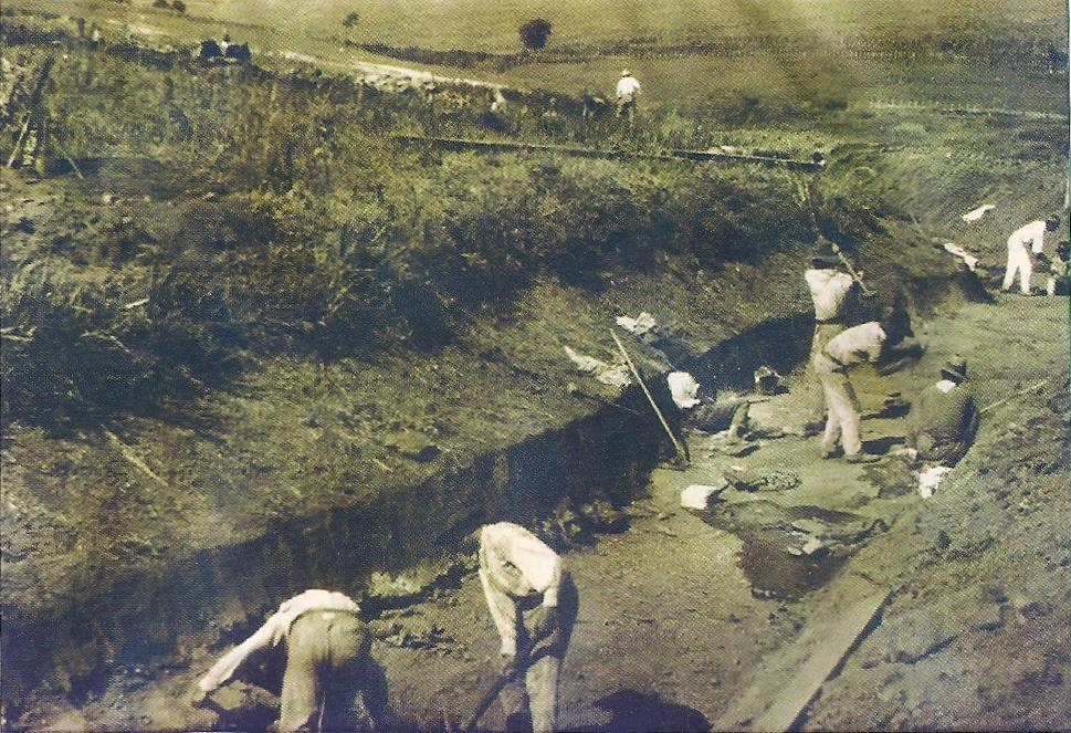 Trabalhadores abrem caminho para a construção de estrada de ferro em Paulínia.